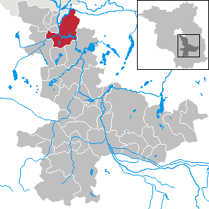 Königs Wusterhausen in Brandenburg (Country) - District Dahme-Spreewald